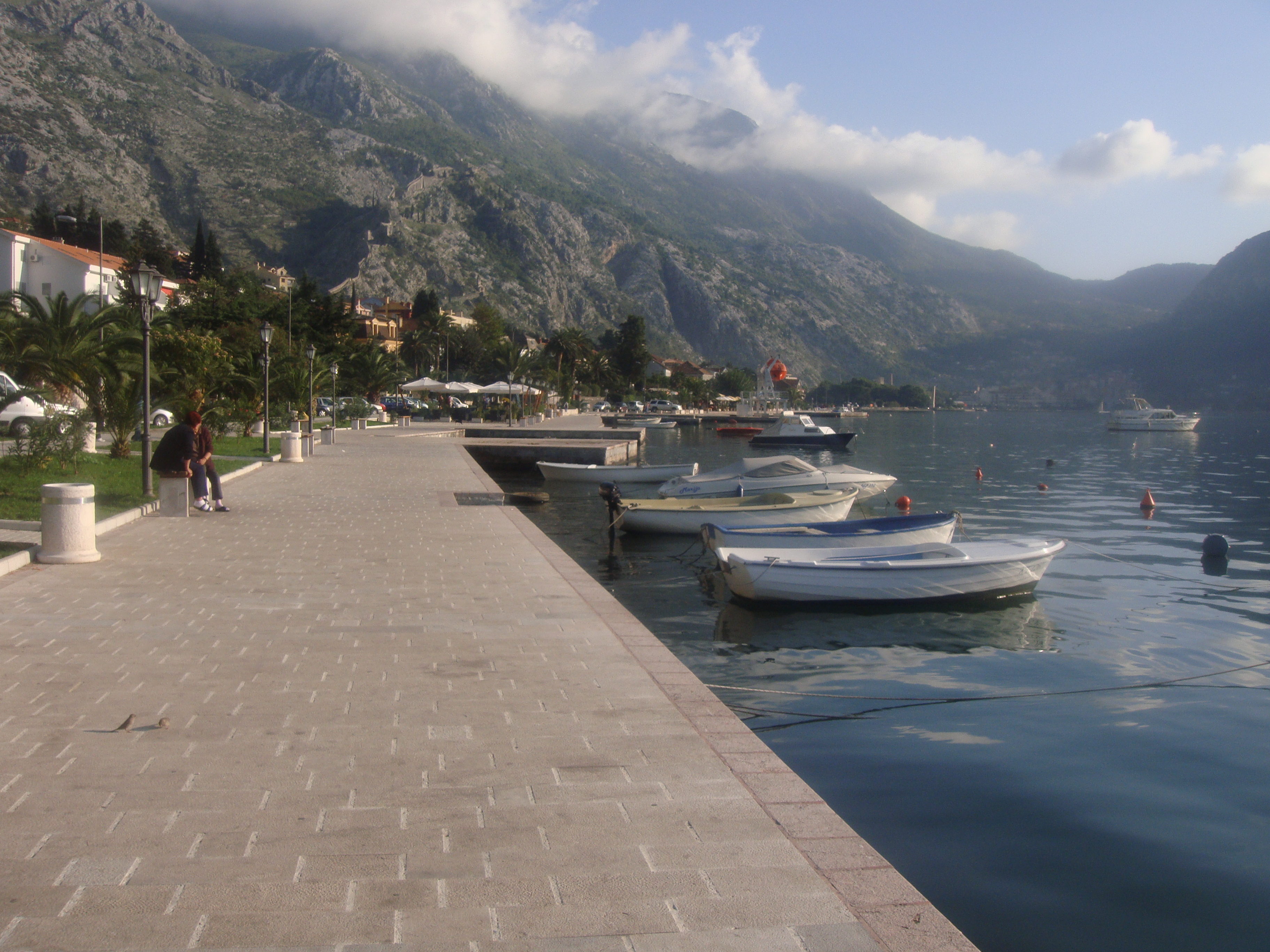 P22, Škaljari, Montenegro